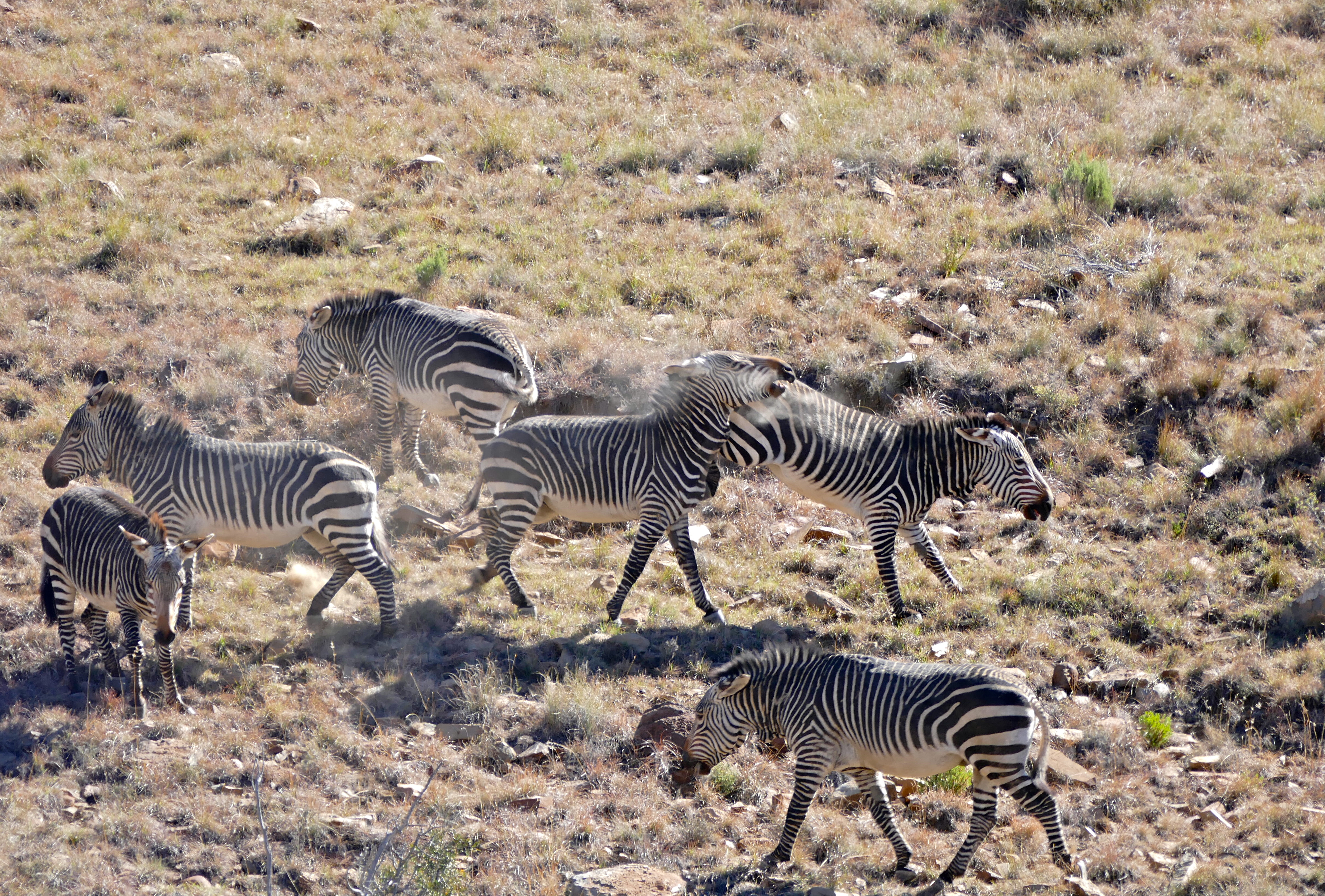 Kranskop Loop, Mountain Zebra NP, Eastern Cape, SOUTH AFRICA